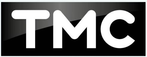 Logo de la chaîne de télévision généraliste, TMC à partir du 12 septembre 2016